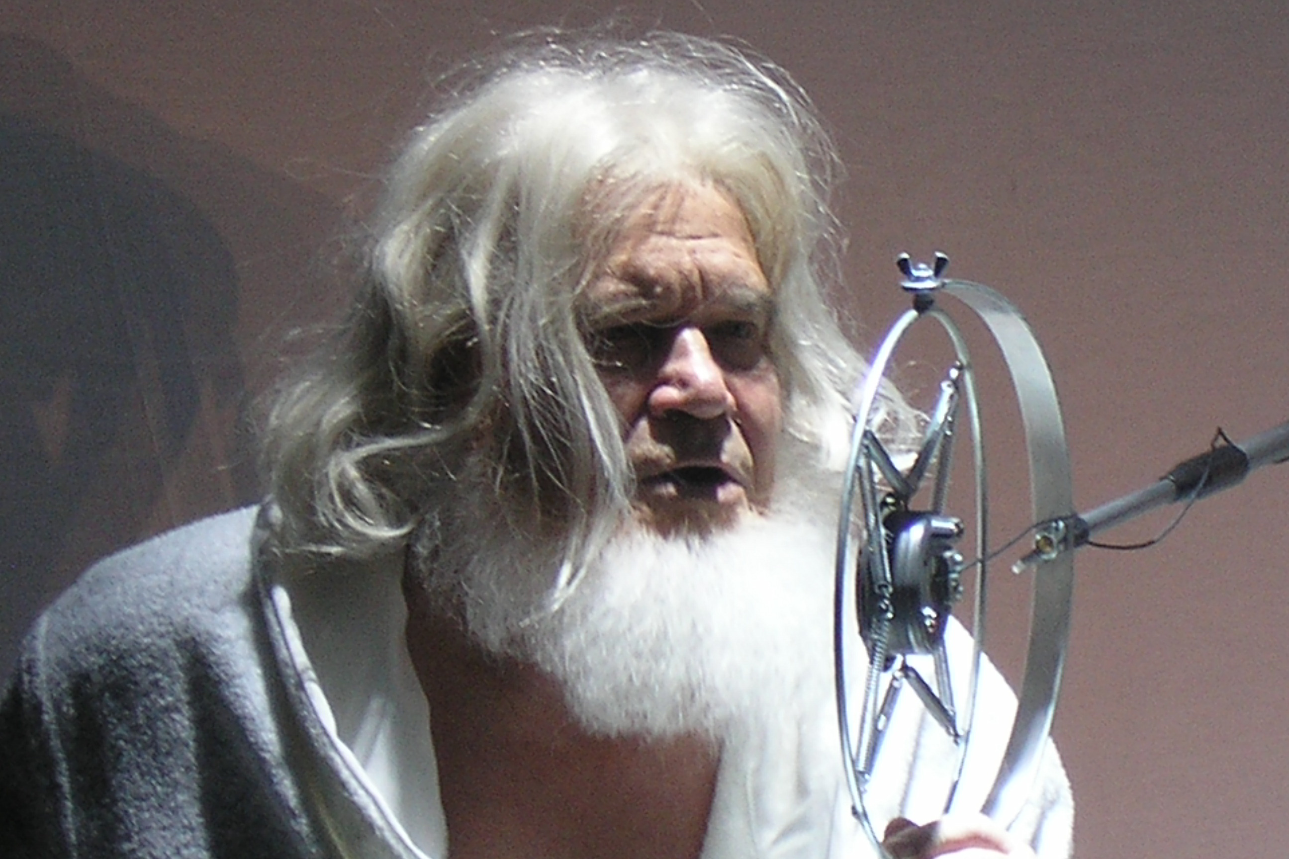 Arthur Miller "Ilma luuminõ & muu äri" (2005). Lavastaja Taago Tubin, kunstnik Mihkel Ehala, muusikaline kujundus Peeter Pai, valguskunstnik Karel Kansvein. Fotol Meinhard Uiga.